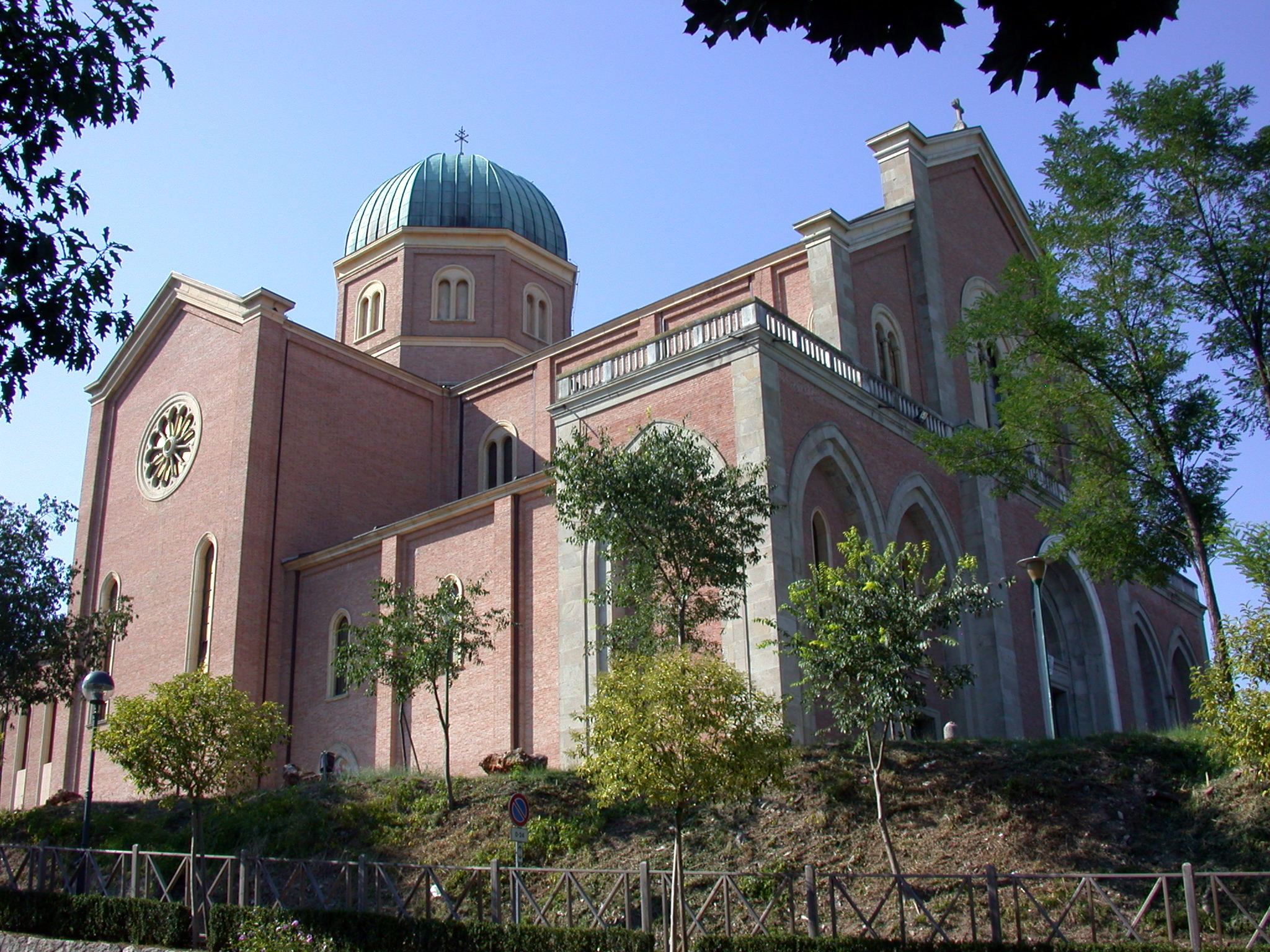 Duomo dei SS. Pietro e Paolo di Montegrotto Terme